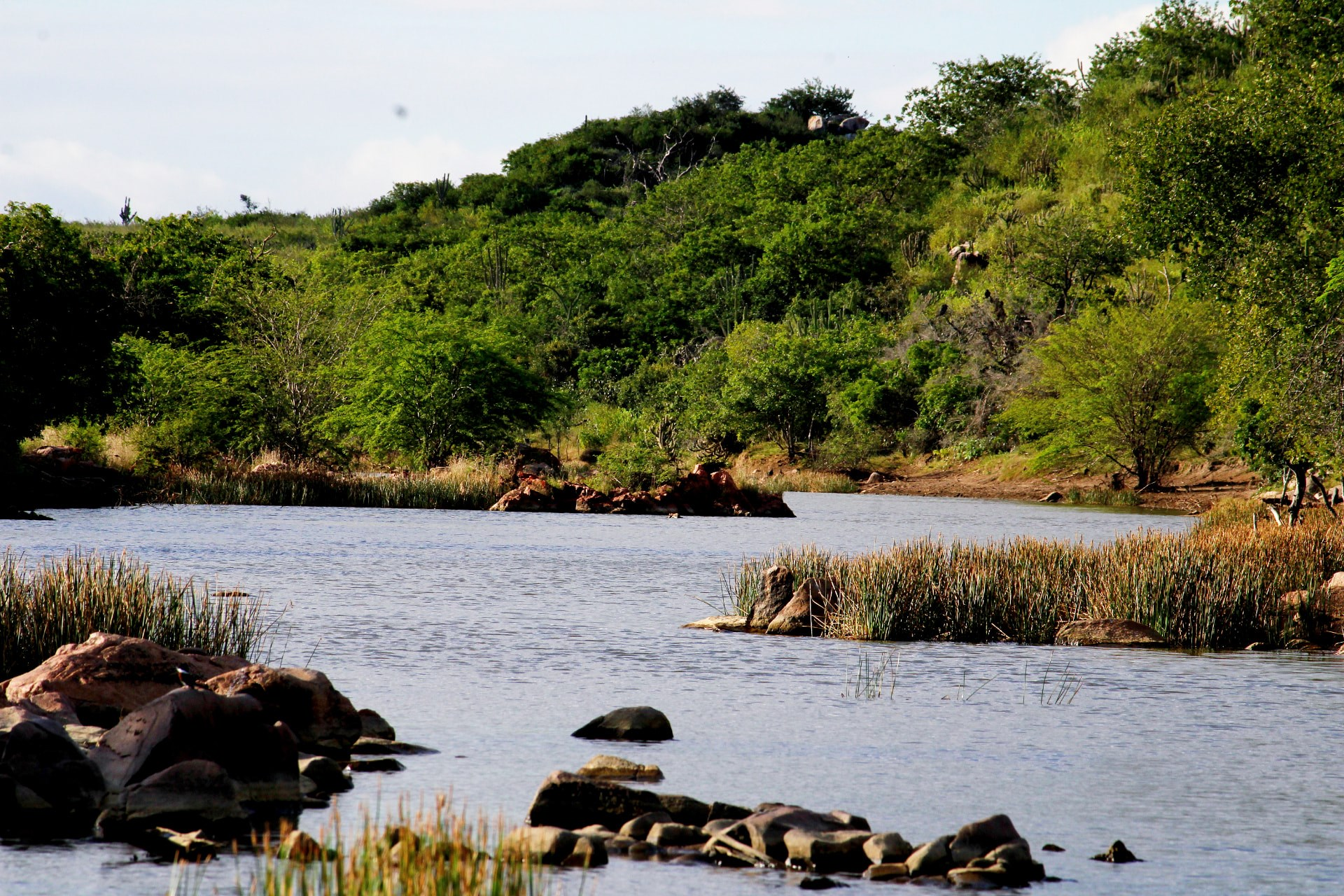 Rio Carnaíba vista de um trecho na região do Povoado de Bela Vista - Araci Bahia. Ver-se na foto a beleza natural deste rio tão importante.